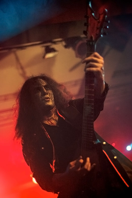 Vesania, Wrocław, Firlej, 13.05.2011